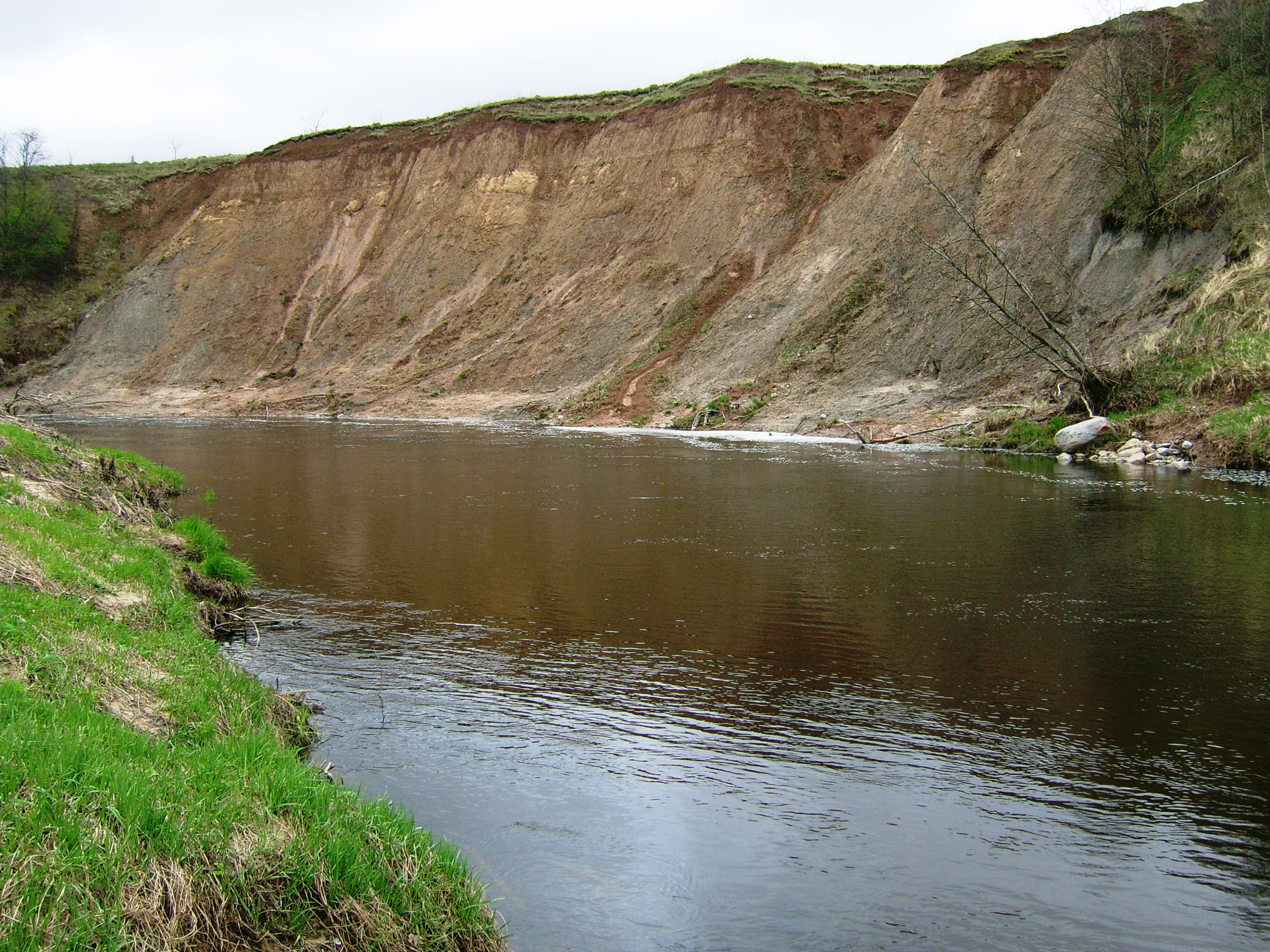 Rekstukų atodanga